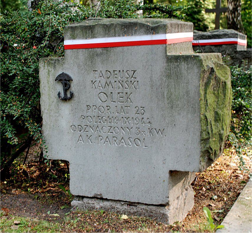 Grób Tadeusza Kamińskiego na Powązkach Wojskowych, Warszawa